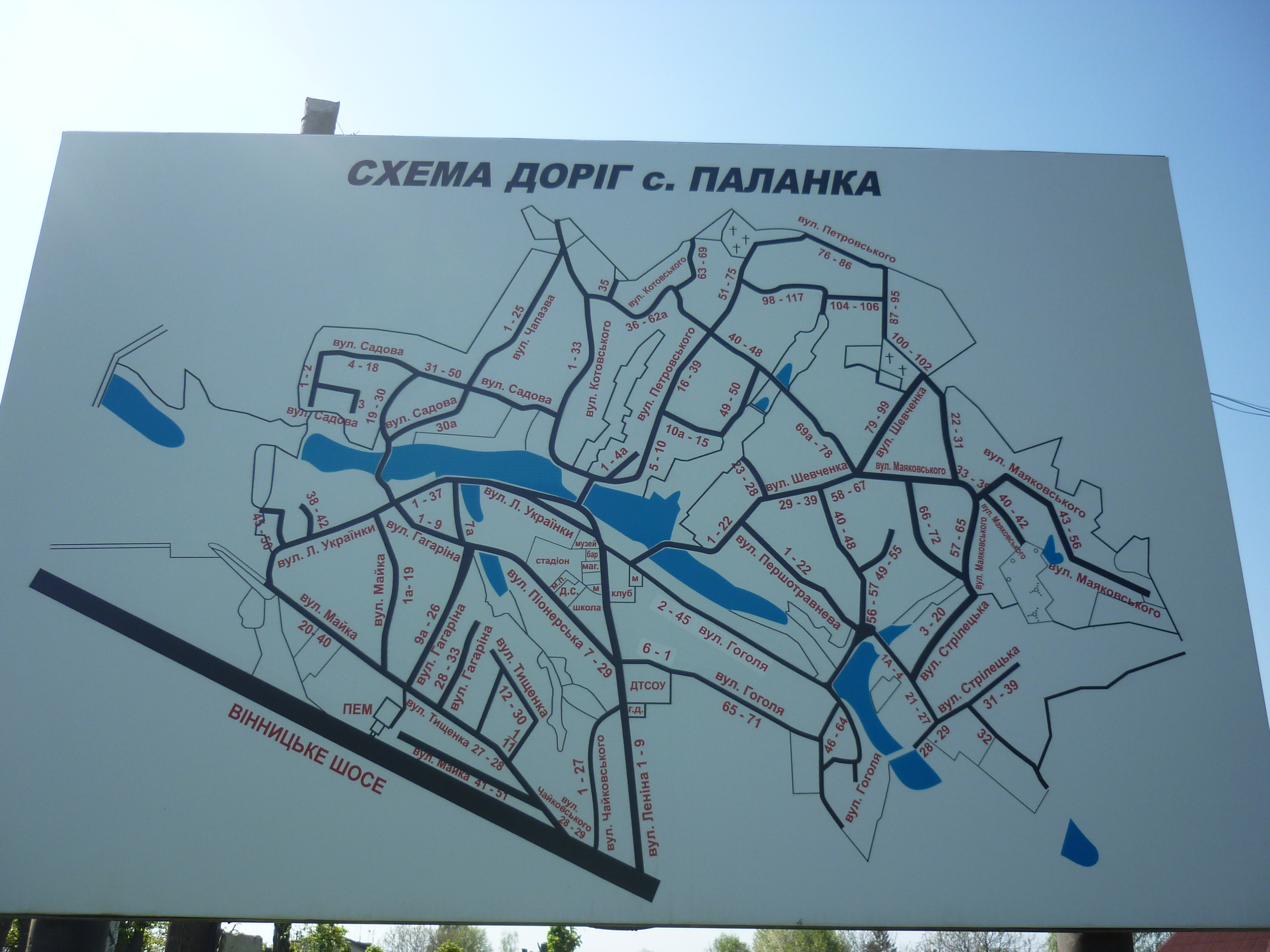 Карта доріг села Паланка Уманського району